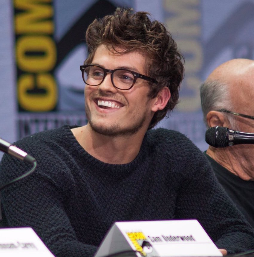 Daniel sharman à la Comic Con en 2017